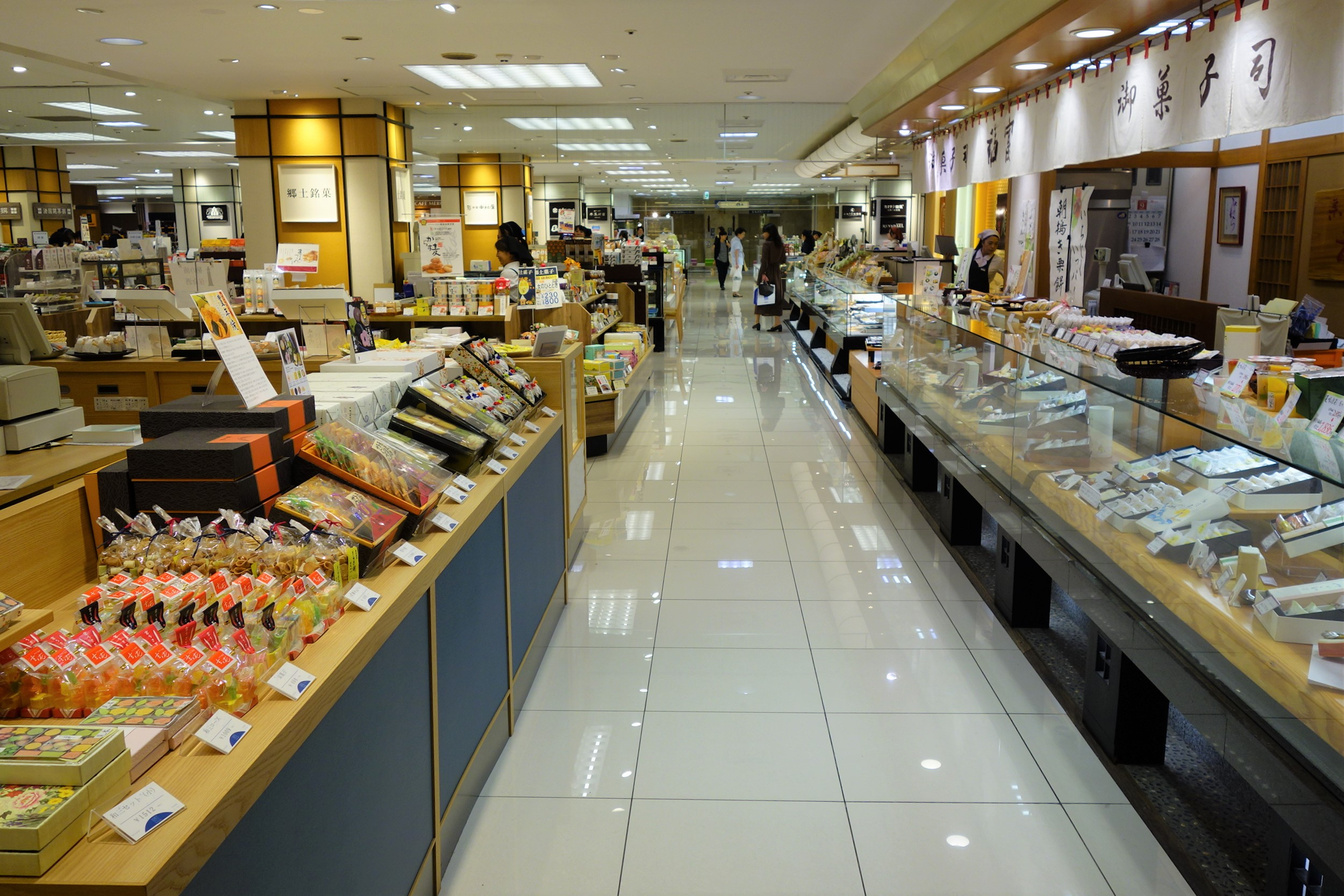 天満屋福山屋 地下一階 食品エリア